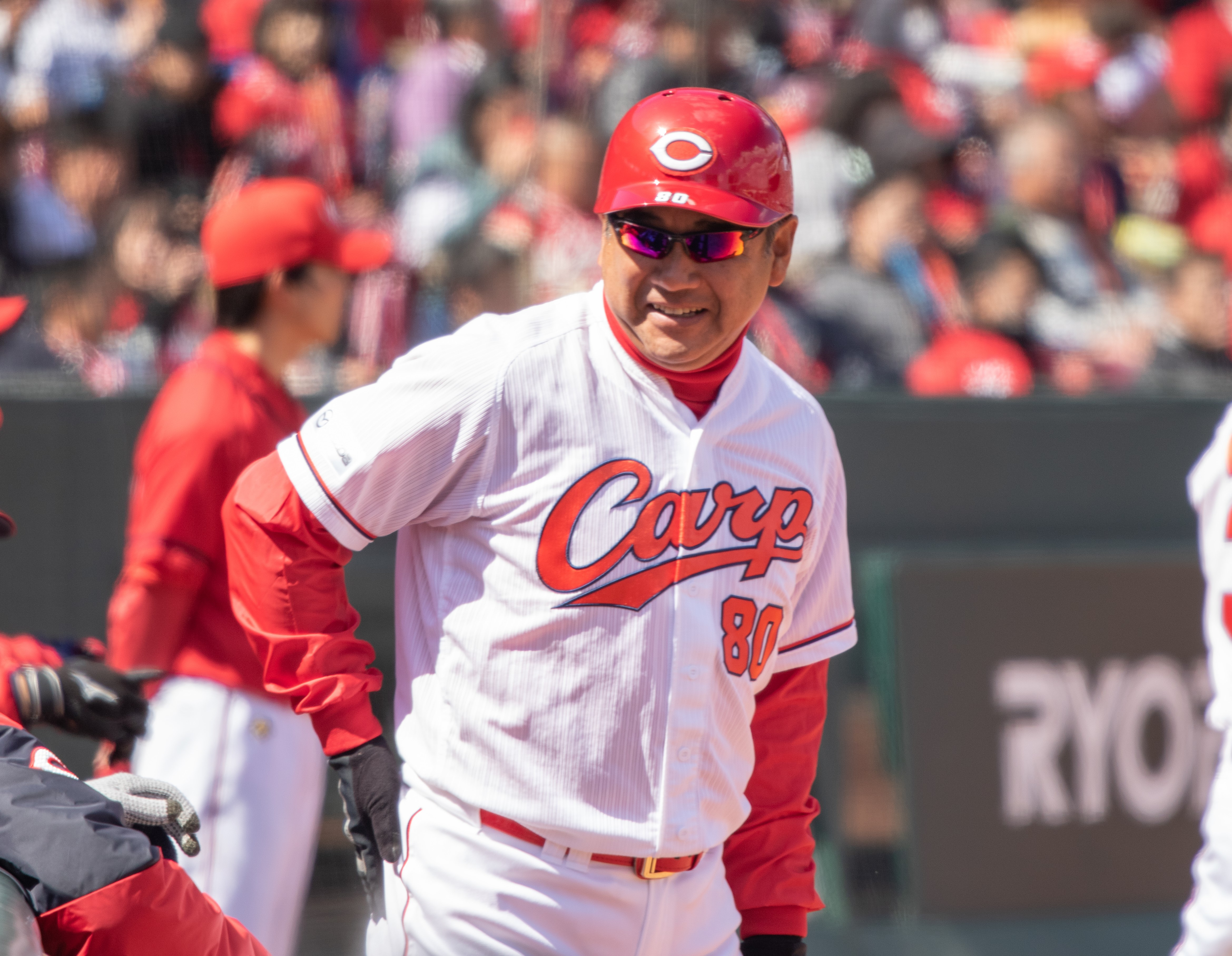 2018/3/13 マツダスタジアム